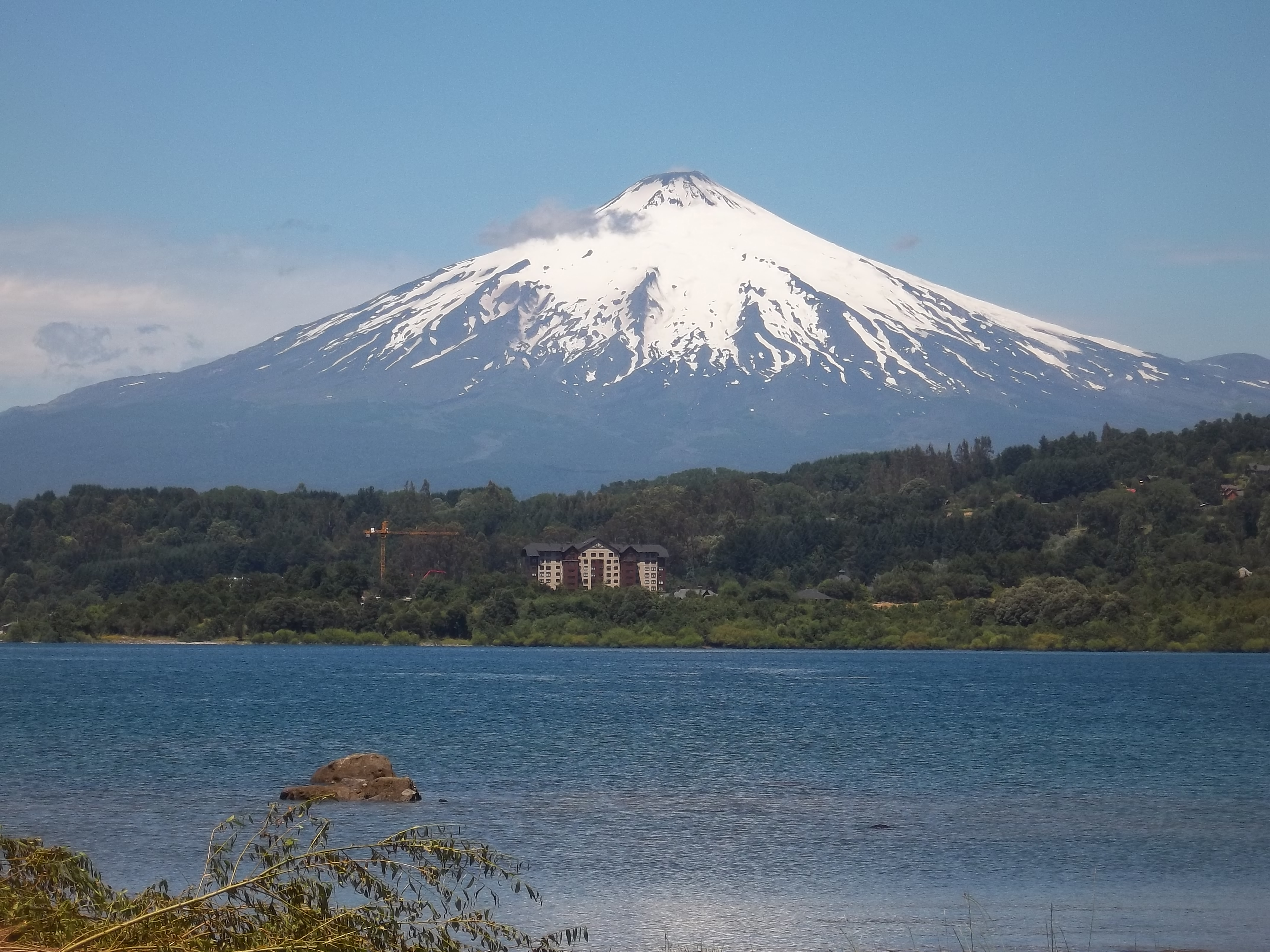 Volcán y lago Villarrica desde la ciudad de Villarrica, Región de La Araucanía, Chile.